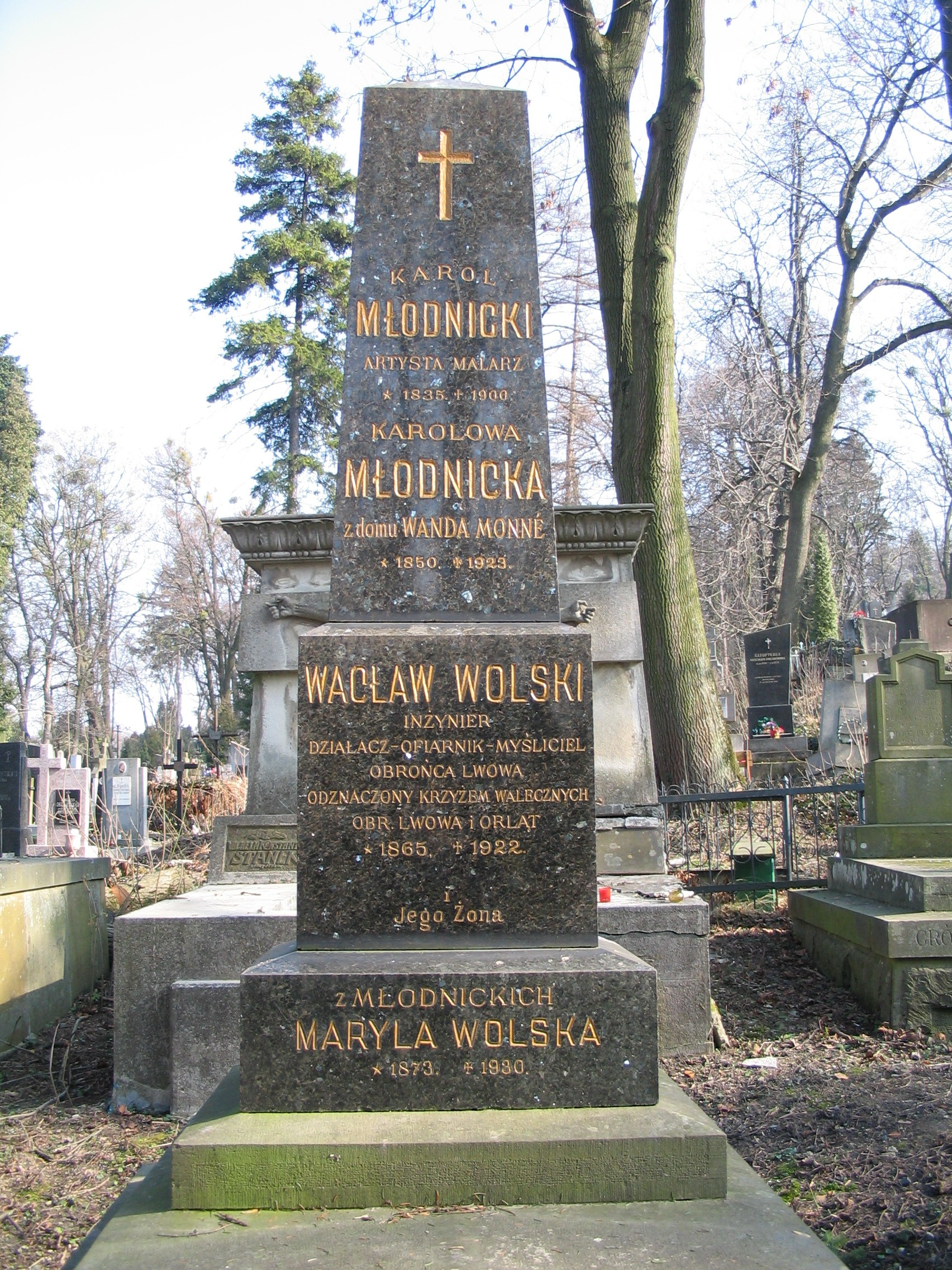 Grave of polish poetess Maryla Wolska on Lychakov Cemetery in Lwow / Grobowiec Młodnickich i Wolskich.